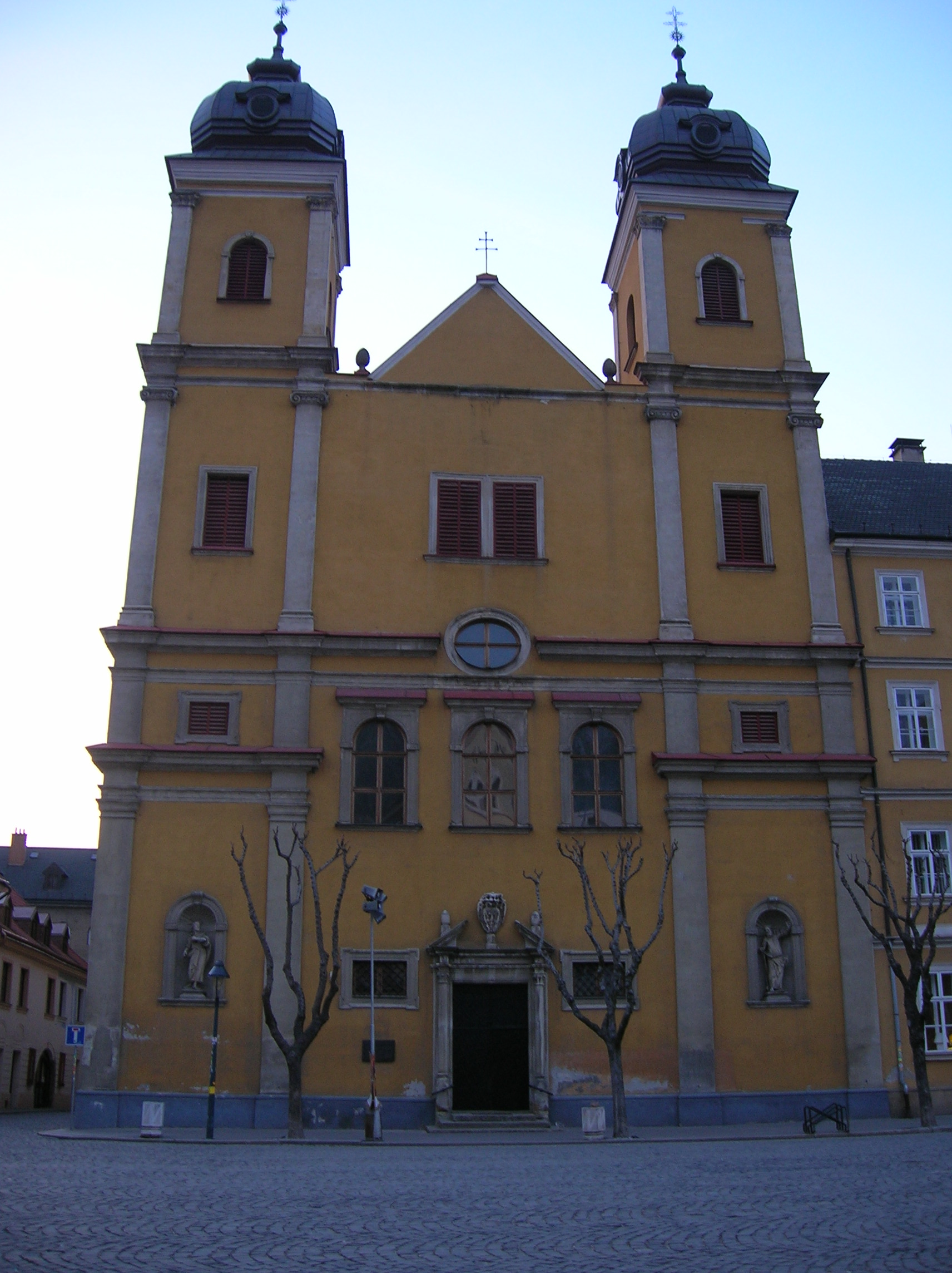 kostol sv. Františka Xaverského, Mierové námestie, Trenčín This medium shows the protected monument with the number 309-1377/2 in the Slovak Republic.